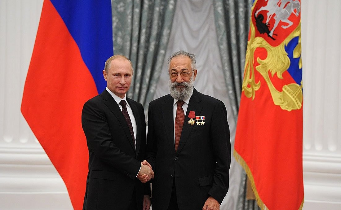 Орденом «За заслуги перед Отечеством» IV степени награждён Артур Чилингаров